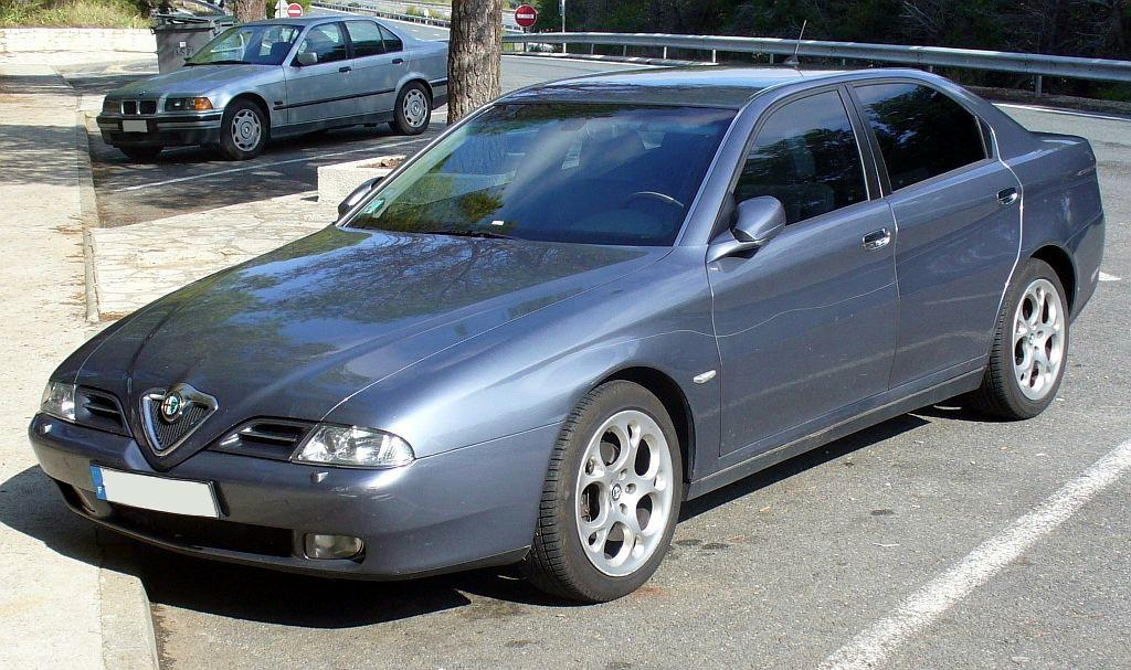 Alfa Romeo 166